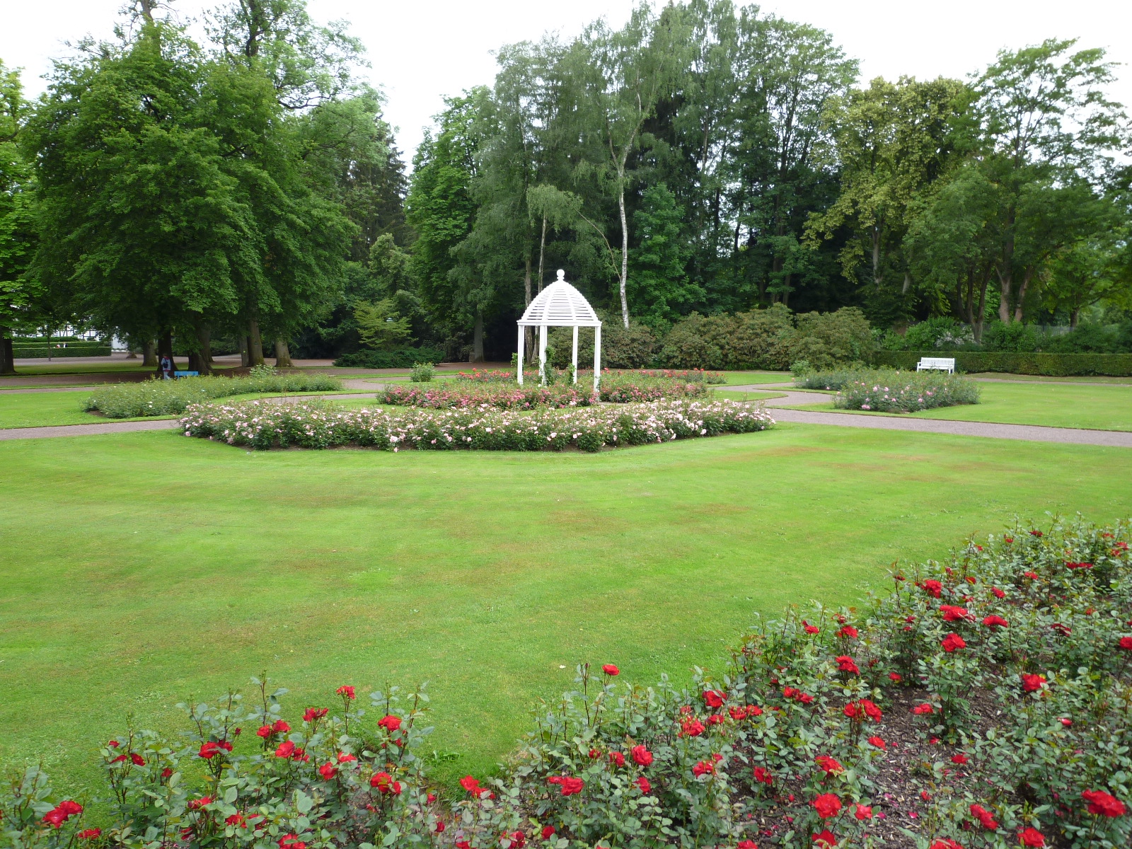 Rosenbeete mit Pavilion im Gräflichen Park Bad Driburg